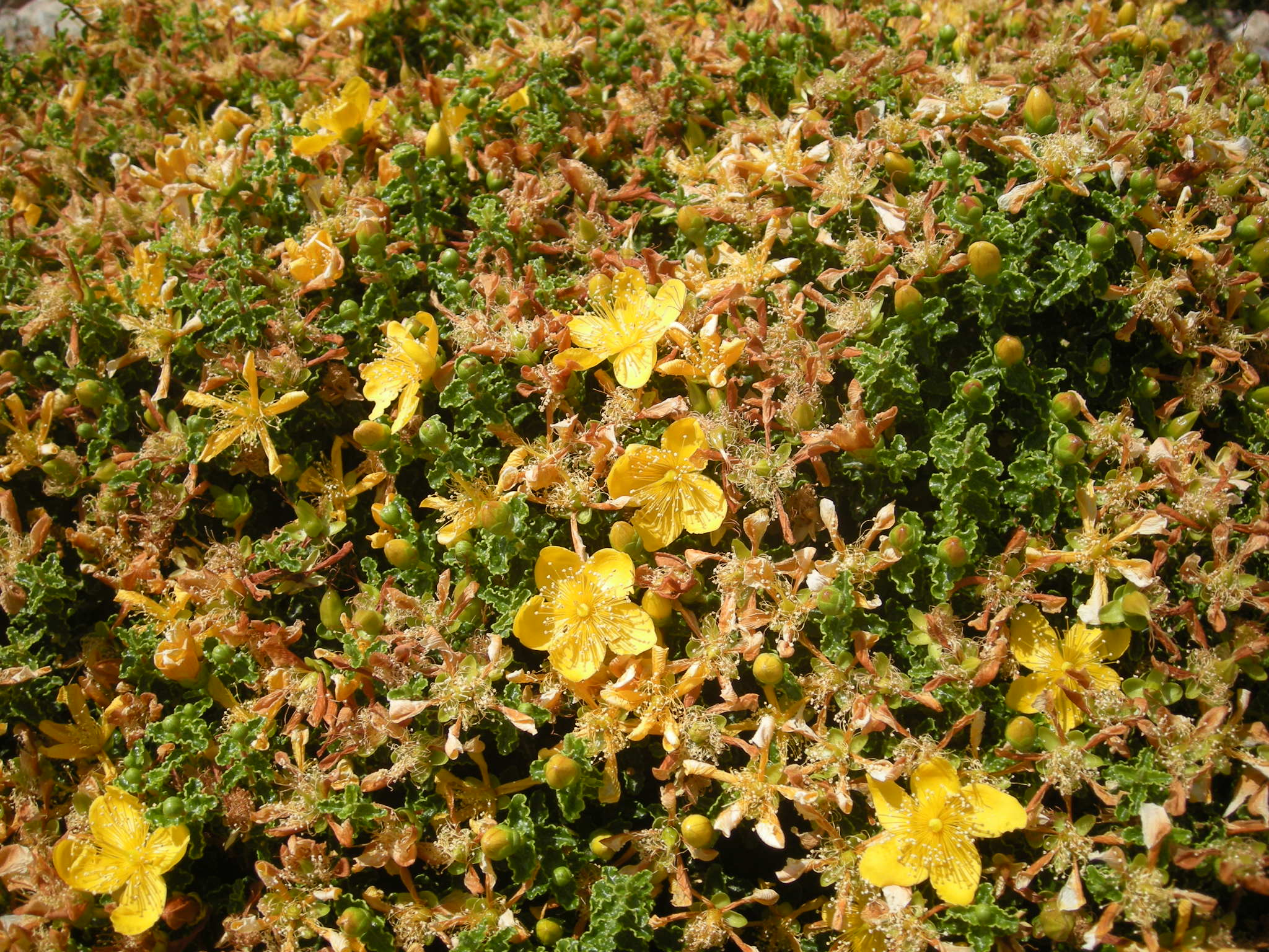 Estepa Joana (Hypericum balearicum), prop del cim del Puig Major, a Mallorca. Detall.